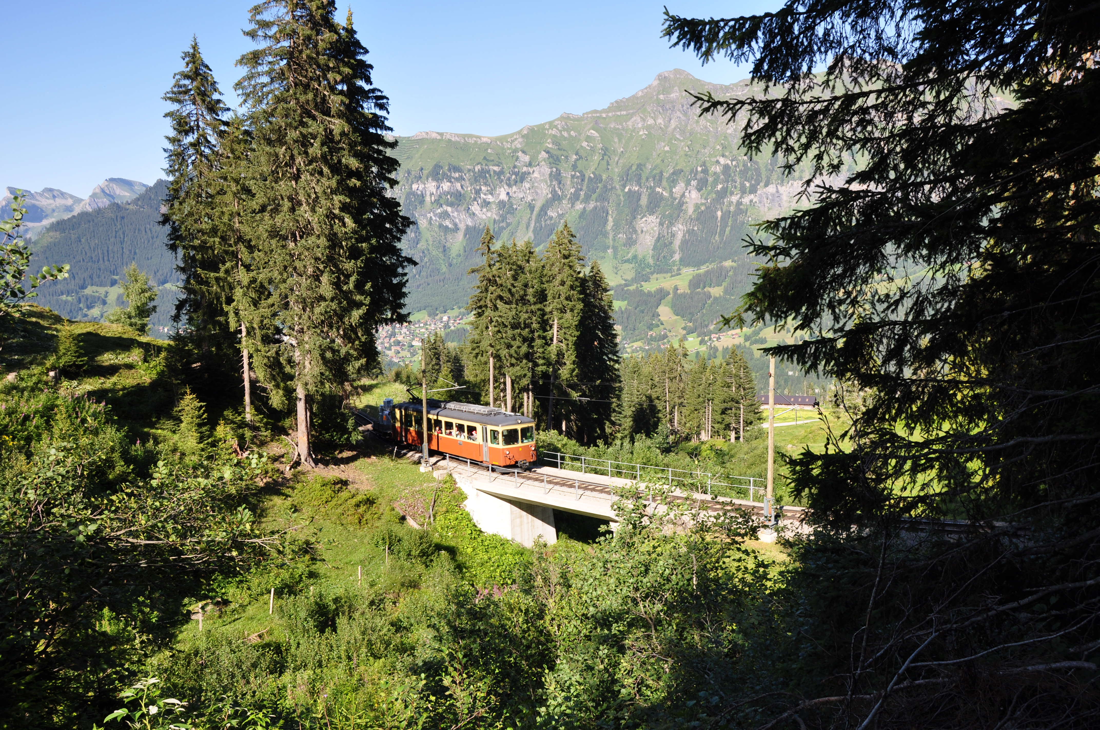 Switzerland, Canton of Bern, Mürrenbahn